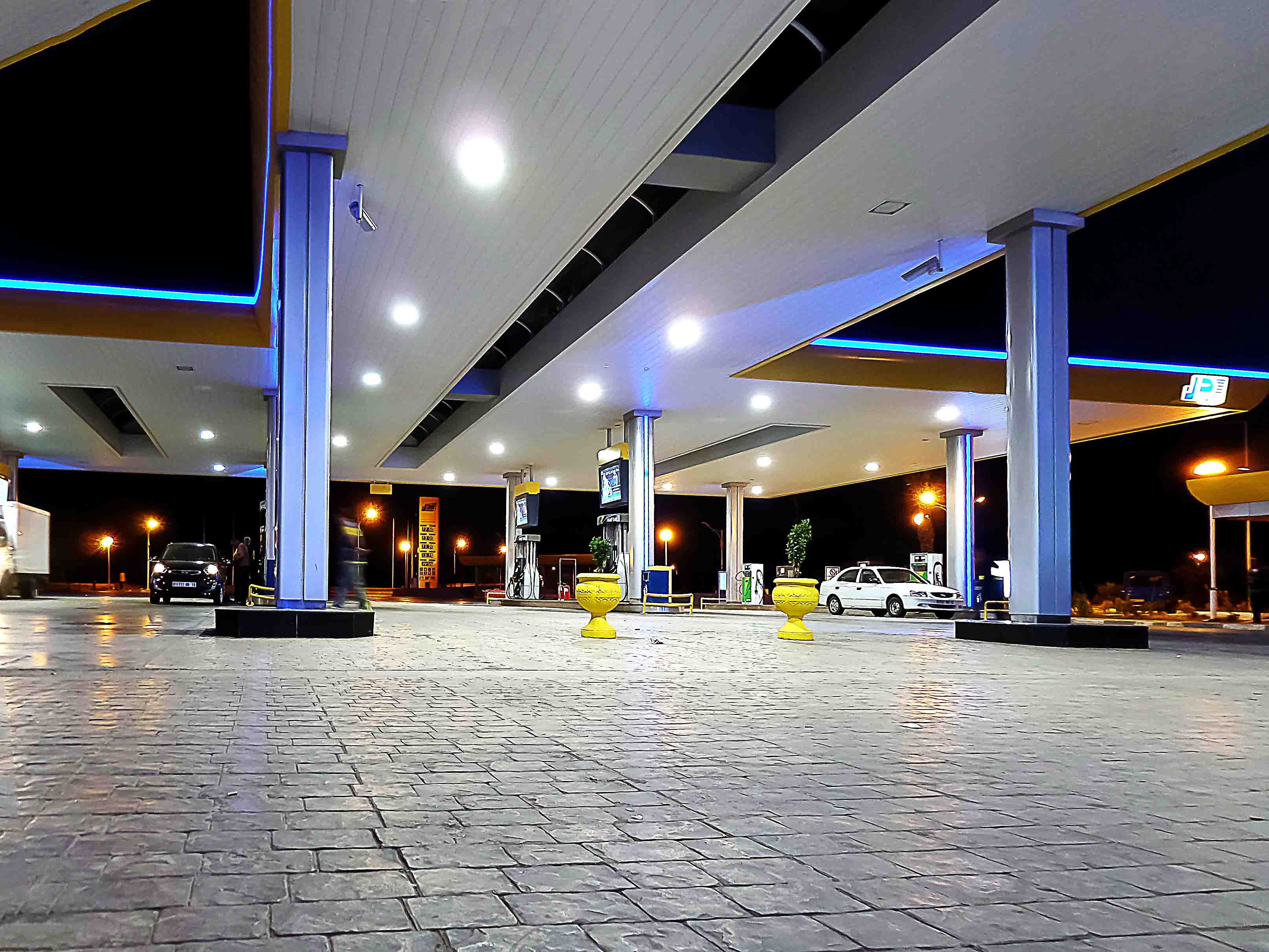 Station Sidi Yacoub محطة سيدي يعقوب